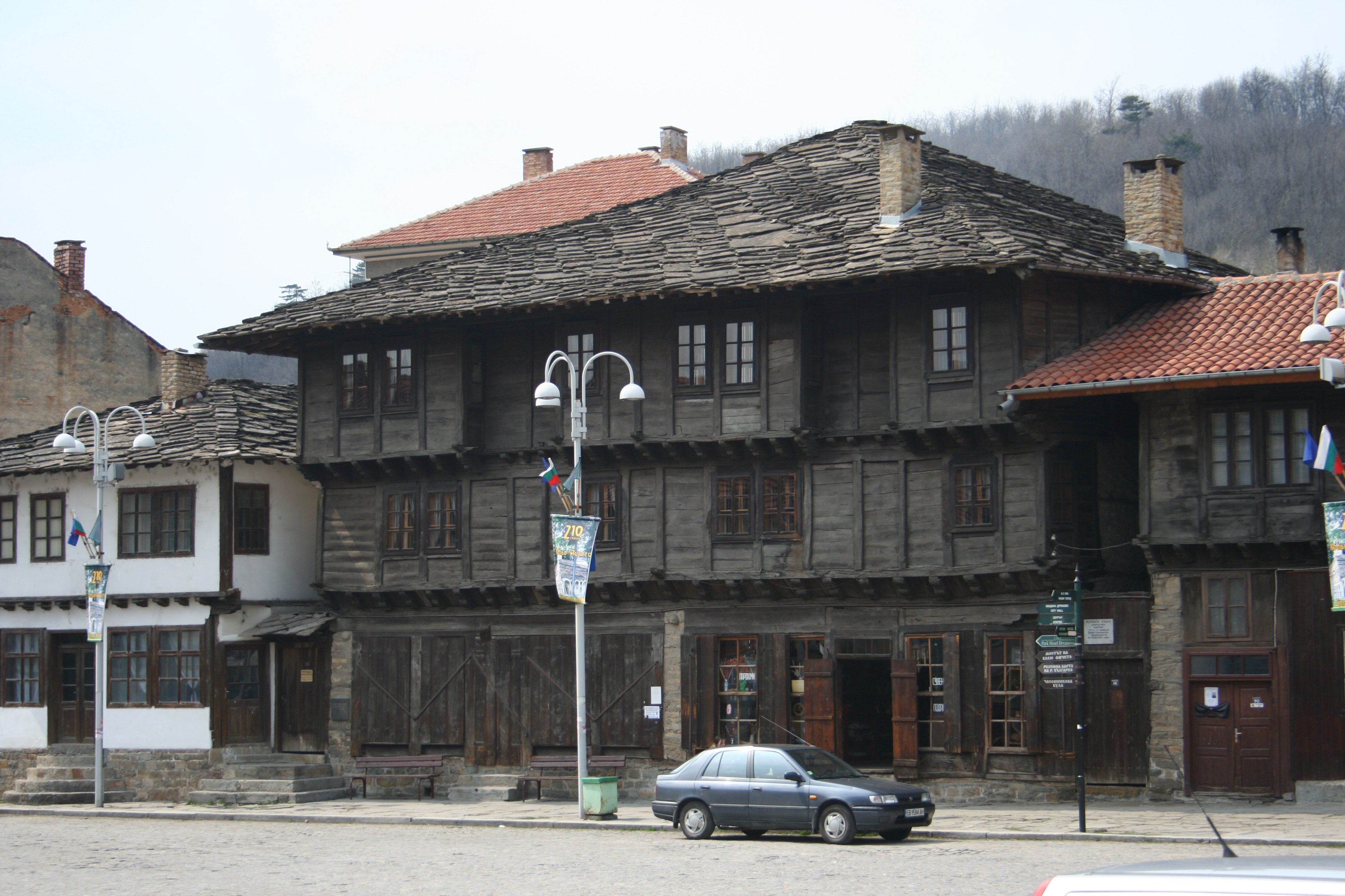 Лафчиевата къща,Дряново